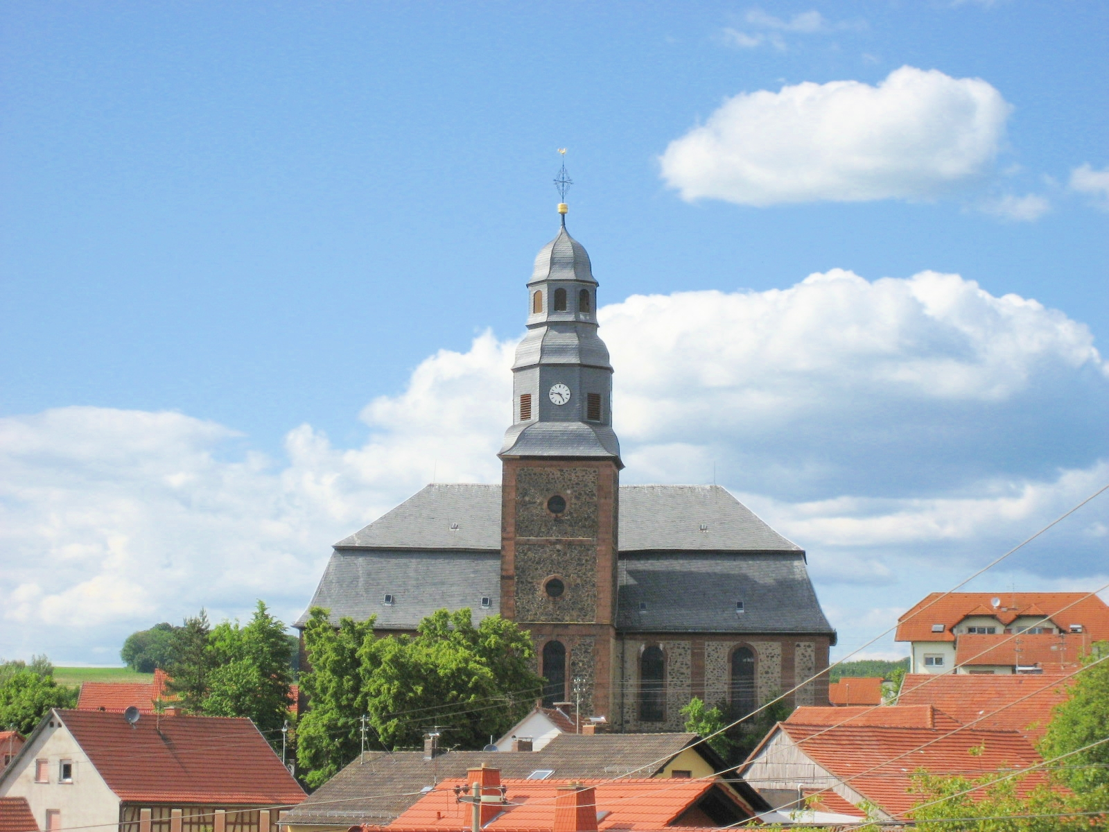 Große Barockkirche in der mitte des Dorfes. Blick auf den südlichen Glockenturm.